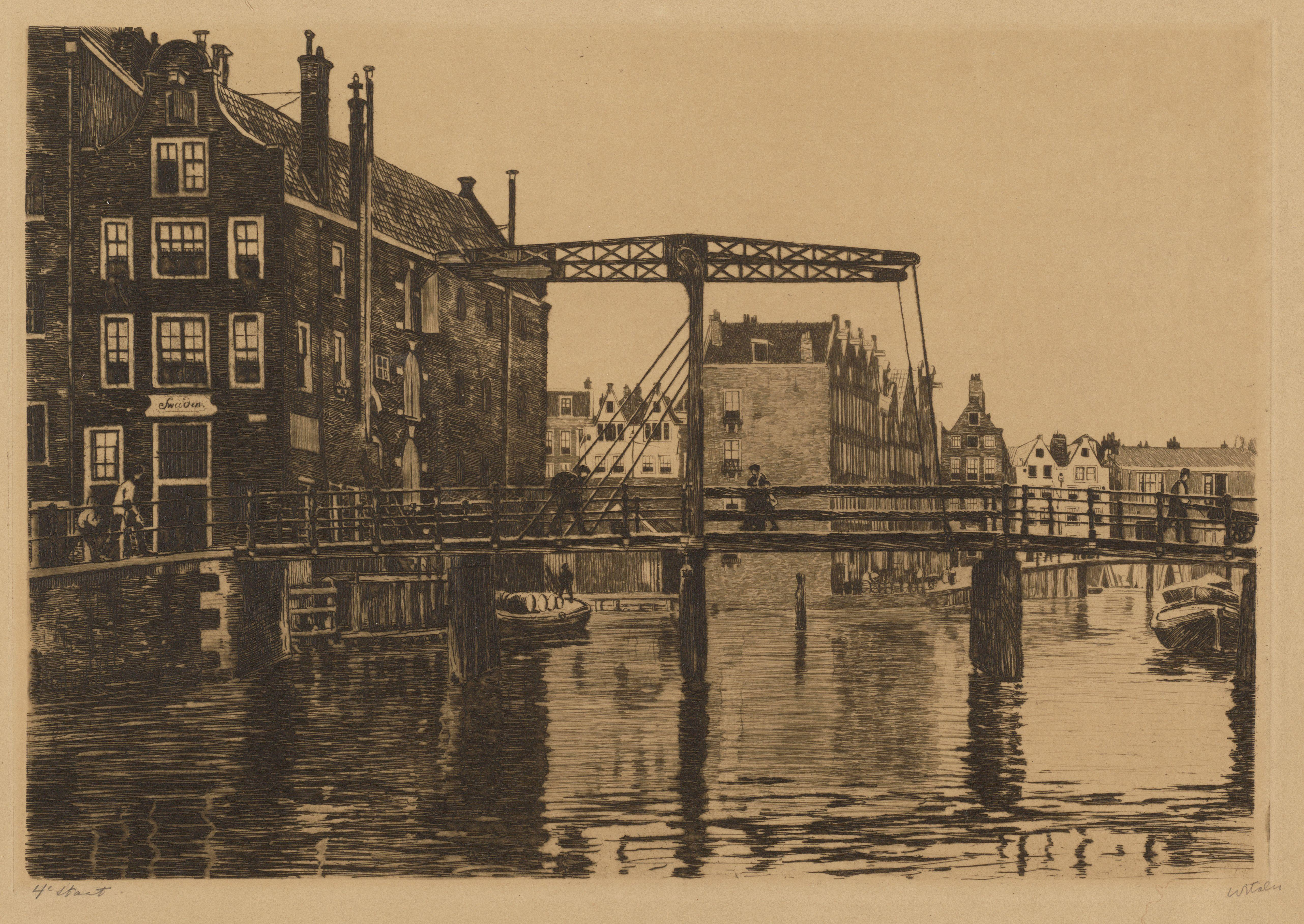 Beschrijving Brug over de Rapenburgwal, met gezicht op het Nieuwe Grachtje ('Uilenburg I') Gezien vanaf de atelierboot van Willem Witsen op de Oudeschans. V.r.n.l. achterzijde huizen Rapenburgerstraat 4-10 , Valkenburgerstraat 1, Nieuwegrachtje 1-9 (v.r.n.l.), achterzijde Valkenburgerstraat (evenzijde), Uilenburgerstraat 1, 3 (ged.) (v.l.n.r.). Op de voorgrond de Peperbrug, op de achtergrond de brug voor de Foeliestraat. Voorstelling in spiegelbeeld. Techniek: ets. Datering vervaardiging: tussen augustus en november 1911. Documenttype prent Vervaardiger Witsen, Willem (1860-1923) Collectie Collectie Atlas Dreesmann Datering augustus 1911 t/m november 1911 Geografische naam Valkenburgerstraat Rapenburgwal Uilenburgerstraat Nieuwegrachtje Rapenburgerstraat Inventarissen Afbeeldingsbestand 010094008221